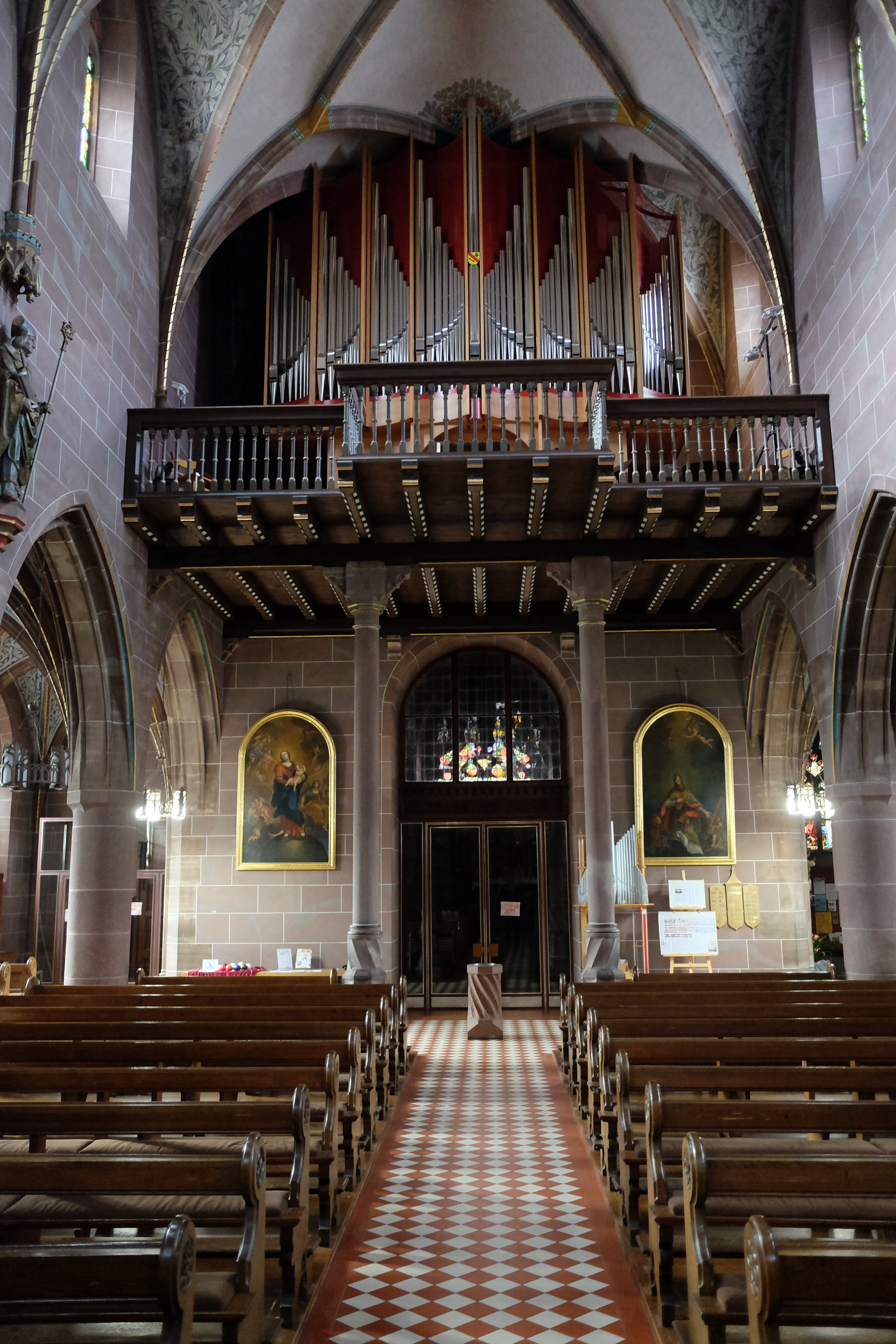 Die Kirche St. Sebastian in Kuppenheim im Landkreis Rastatt.